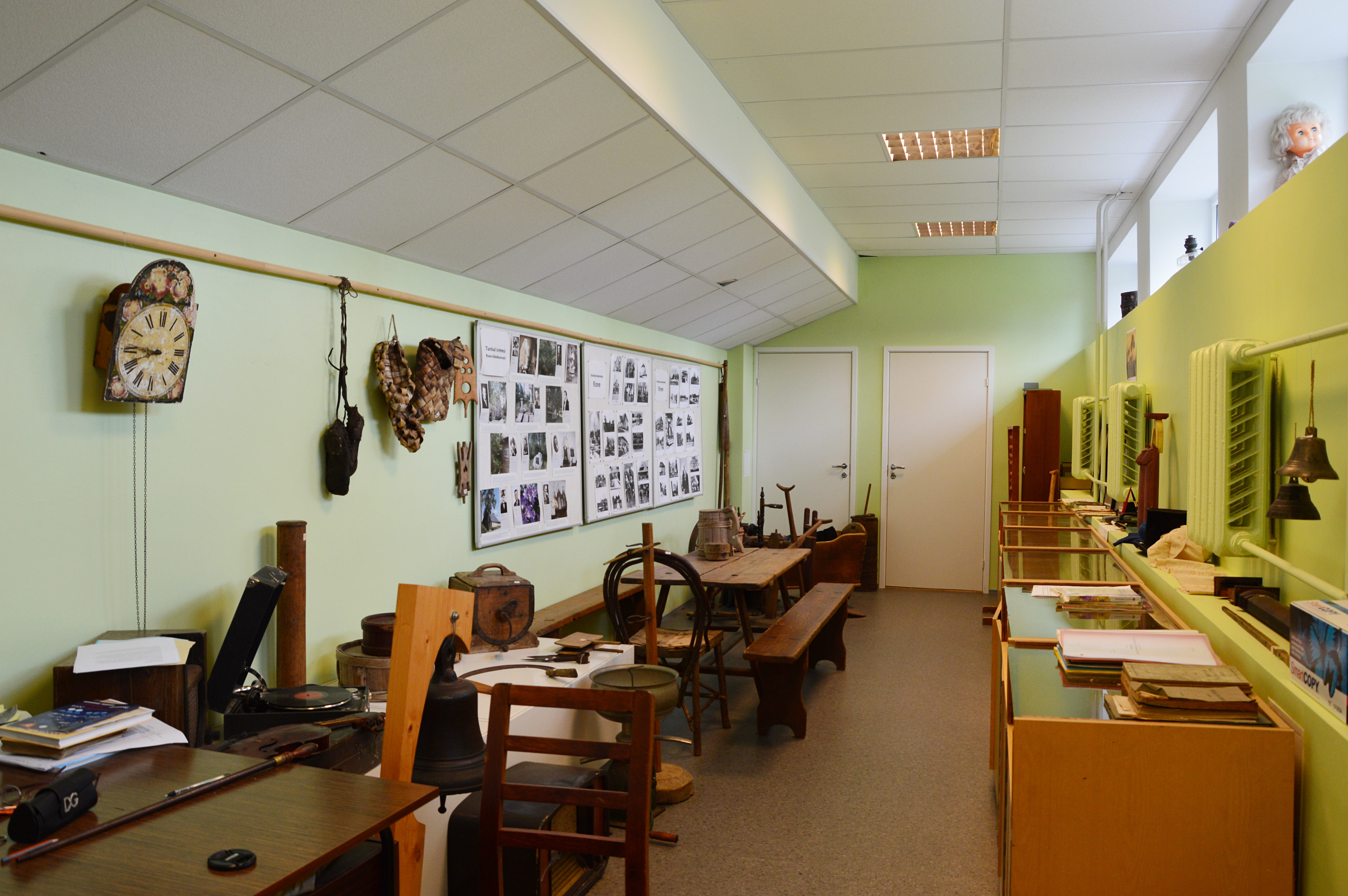 Üks Kose-Uuemõisa Koduloomuuseumi ruumidest Kose Gümnaasiumi hoones.